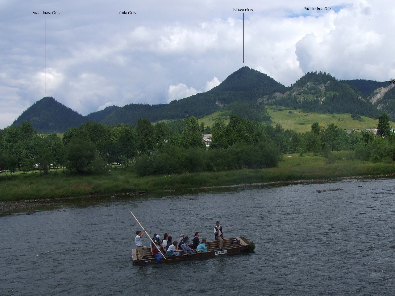 Pieniny. Widok z Czerwonego Klasztoru